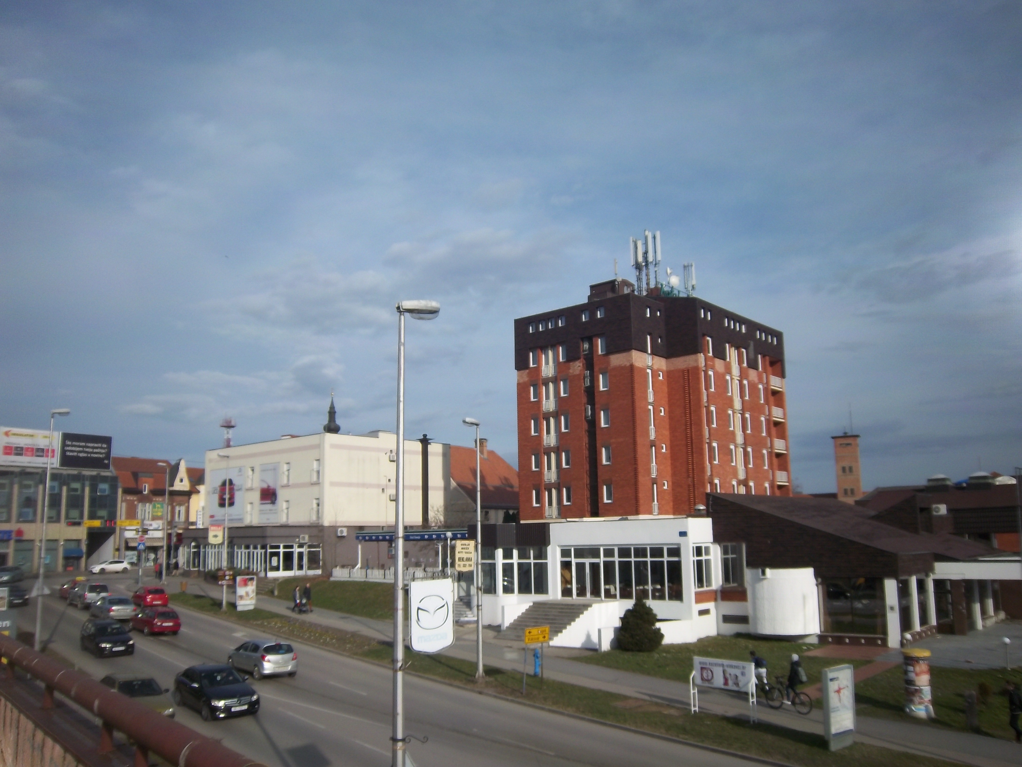 Srpskohrvatski / српскохрватски: Vinkovci u istočnoj Hrvatskoj.